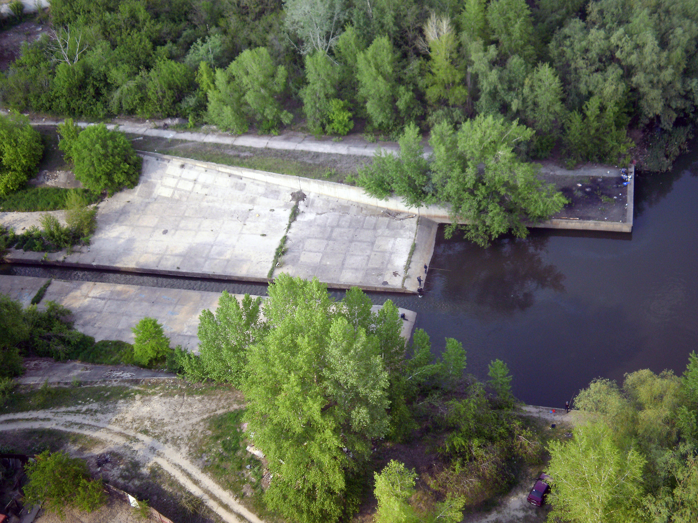 в Киеве